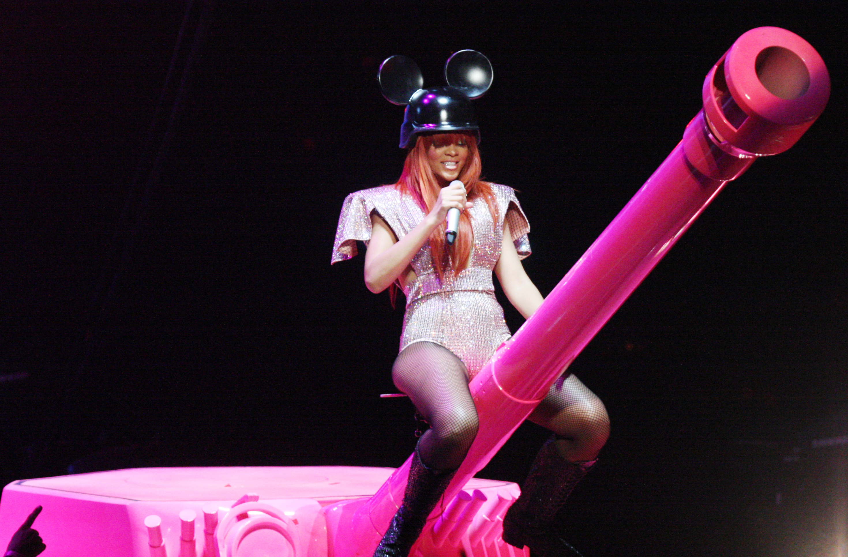 Rihanna